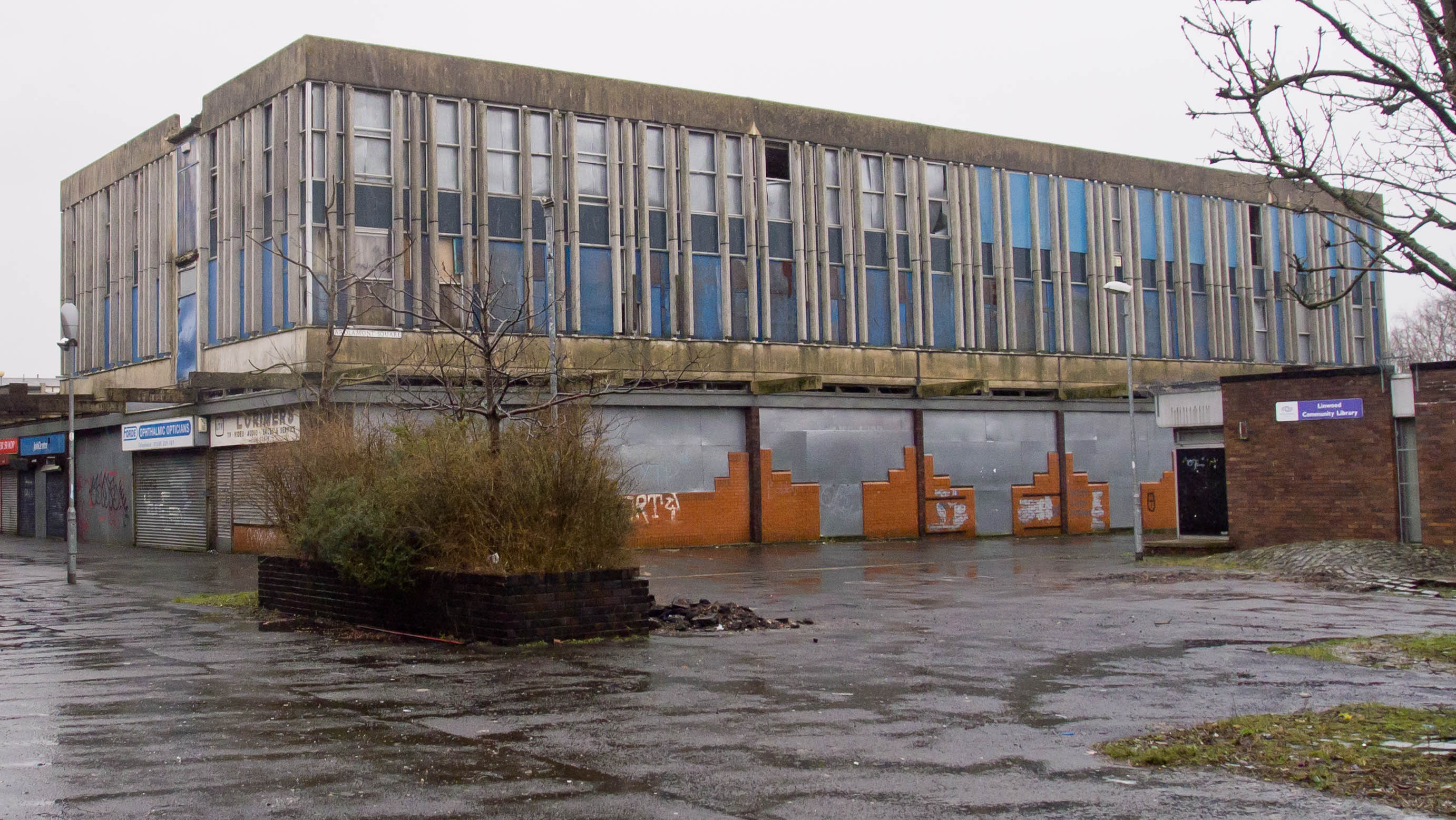 Linwood derelict shopping centre